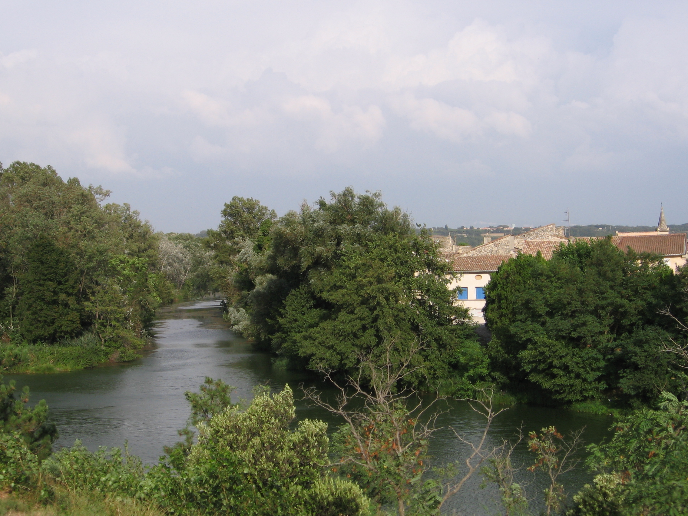 Ancône, France